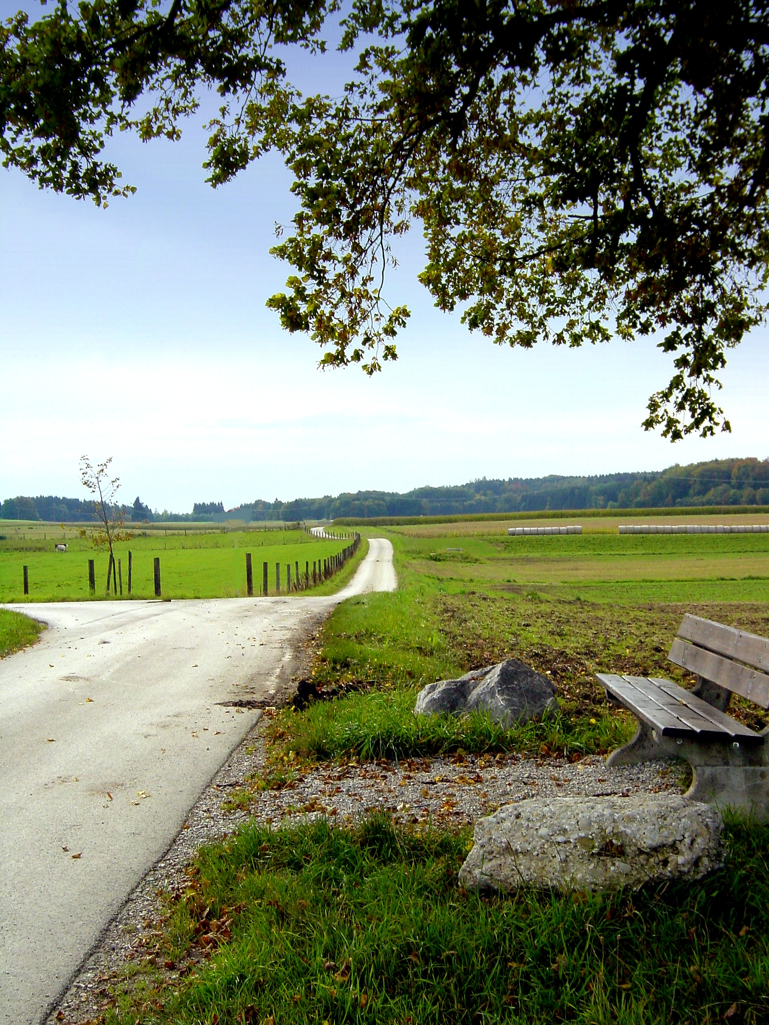 Die Römerstrasse Kempten-Gauting wird im Bereich von Perchting noch heute als Wirtschaftsweg zur Bearbeitung der angrenzenden Felder genutzt. (Bodendenkmal D-1-8033-0021)